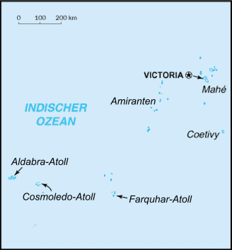 Karte der Seychellen (auf Deutsch · in German)